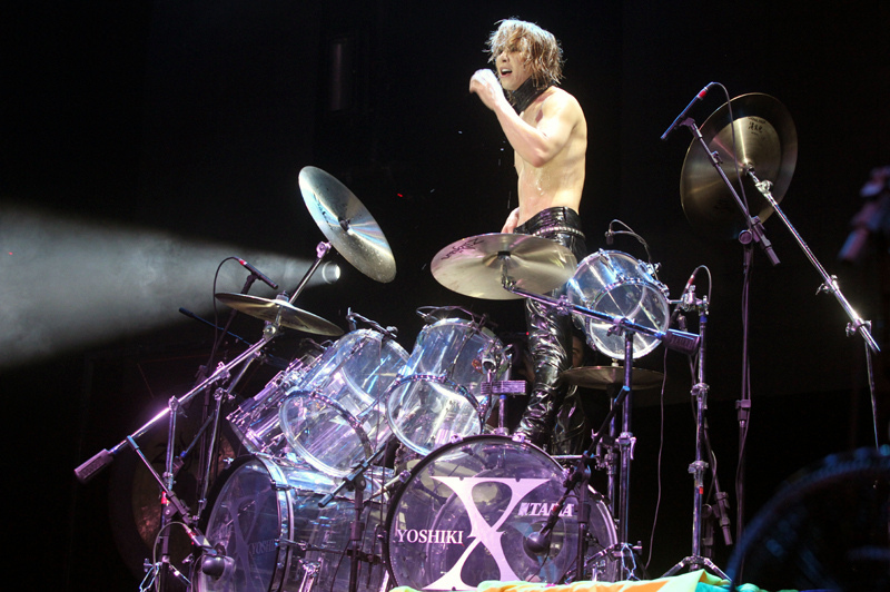 HSBC Brasil - São Paulo/SP - 11/09/2011